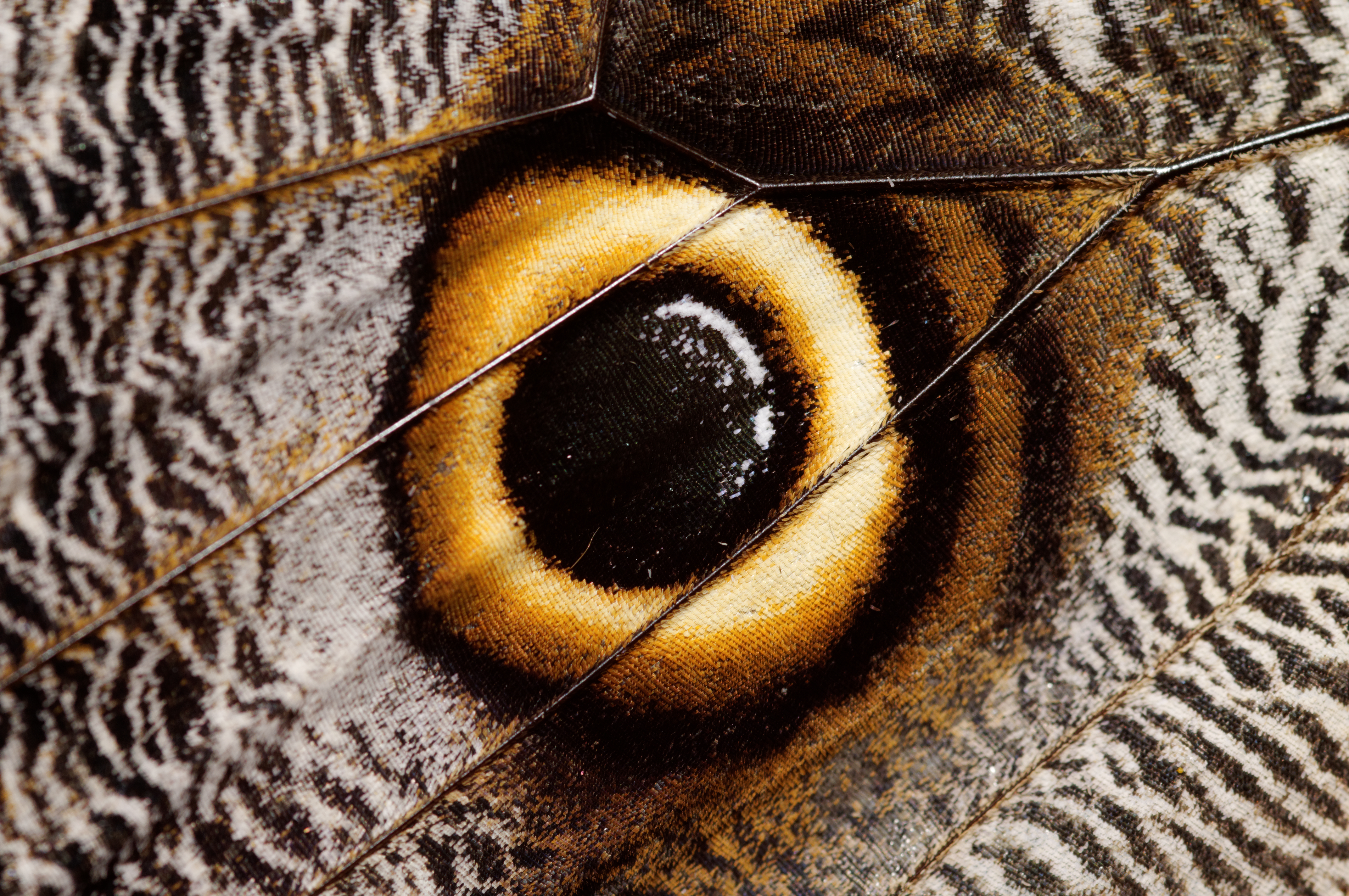 This photograph was taken with a Nikon D300 Détail d'une ocelle d'un lépidoptère du genre Caligo, vu au Jardin des papillons, à Hunawihr (France).